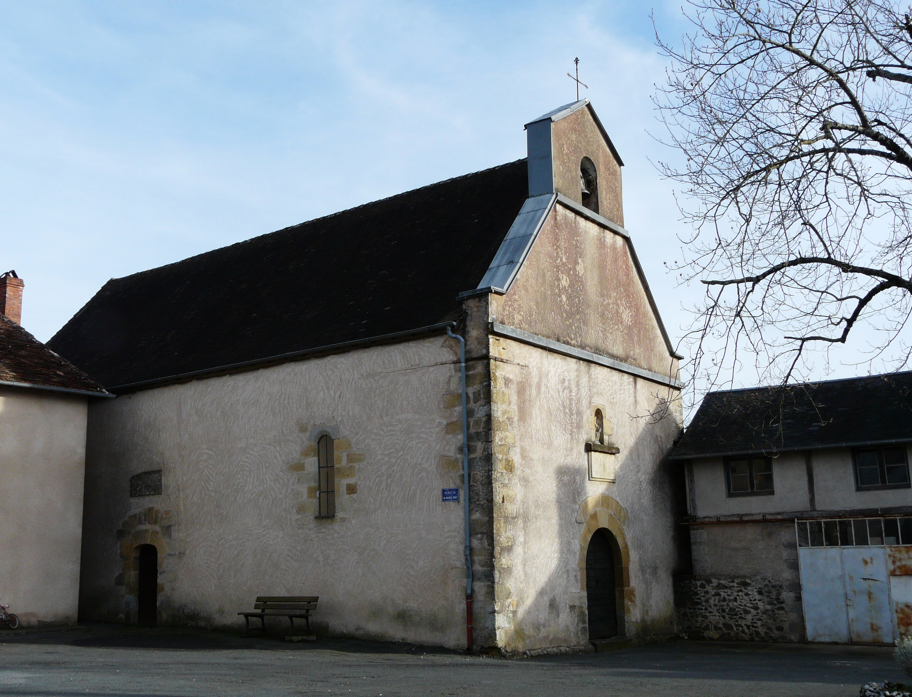 L'église Notre-Dame de l'Assomption, Savignac-Lédrier, Dordogne, France